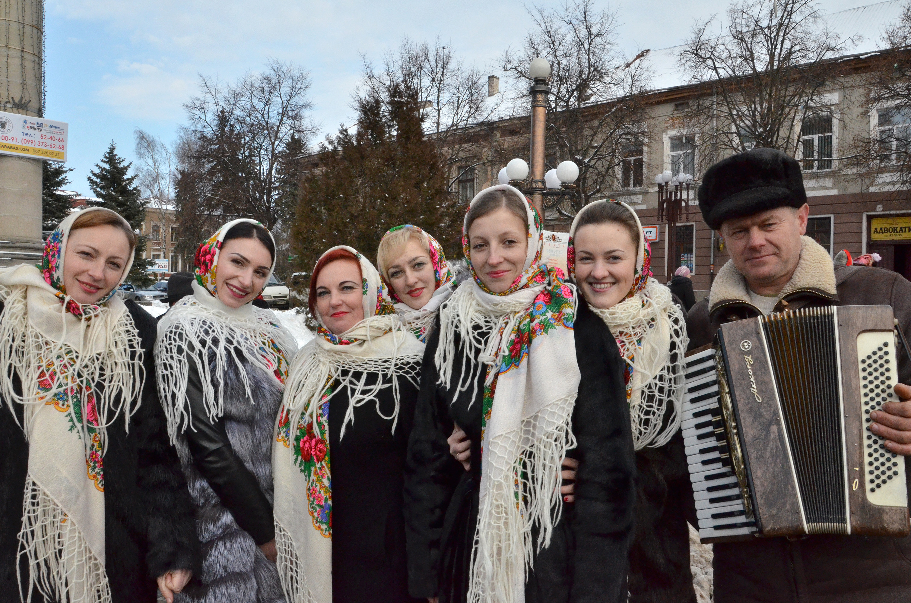 Дівочий вокальний ансамбль села Соколів Бучацького району Тернопільської області на параді вертепів у Тернополі 15 січня 2017 року.